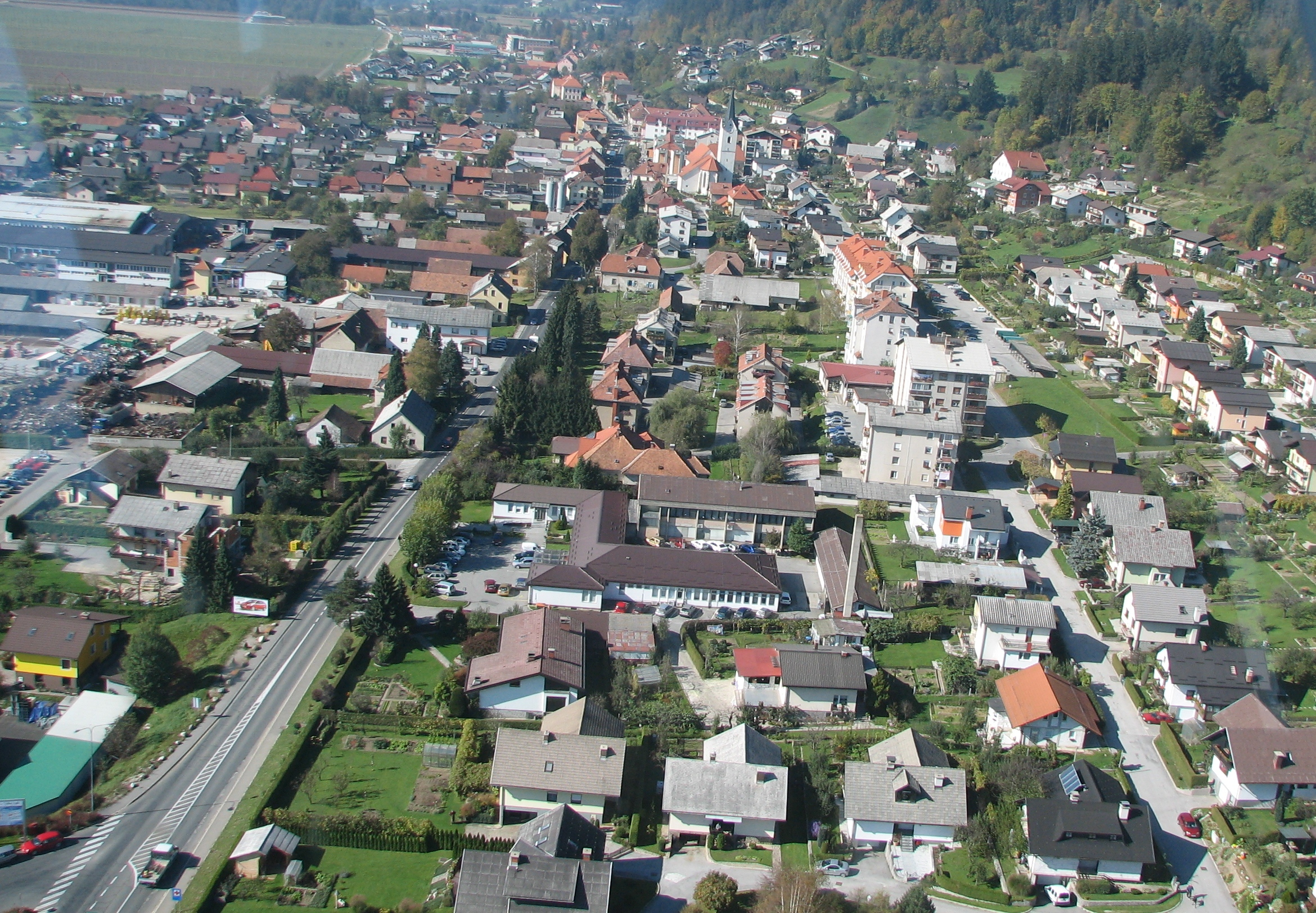 Mesto Radlje ob Dravi.